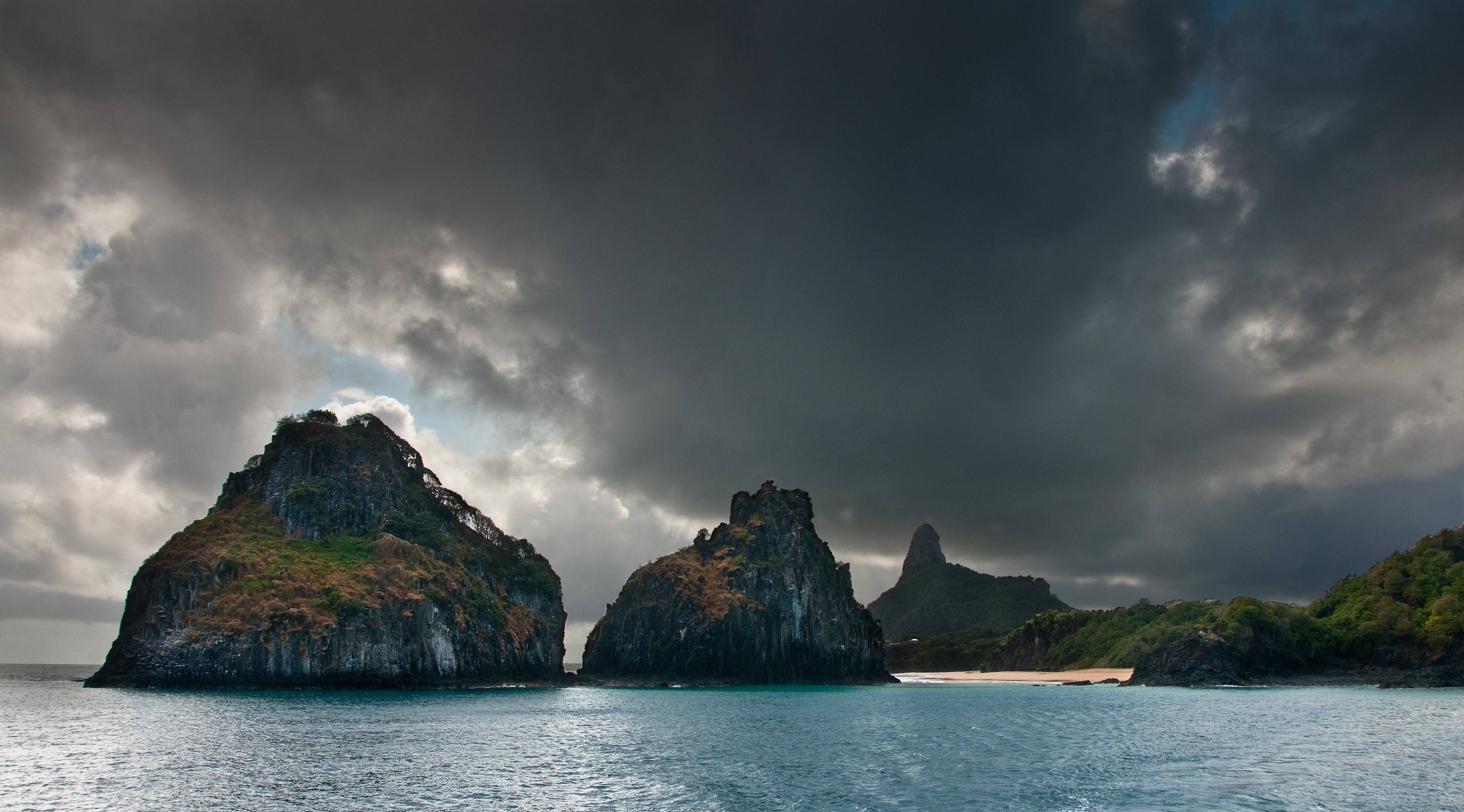 Nuvens carregadas cobrindo o céu de Fernando de Noronha — Pernambuco, Brasil